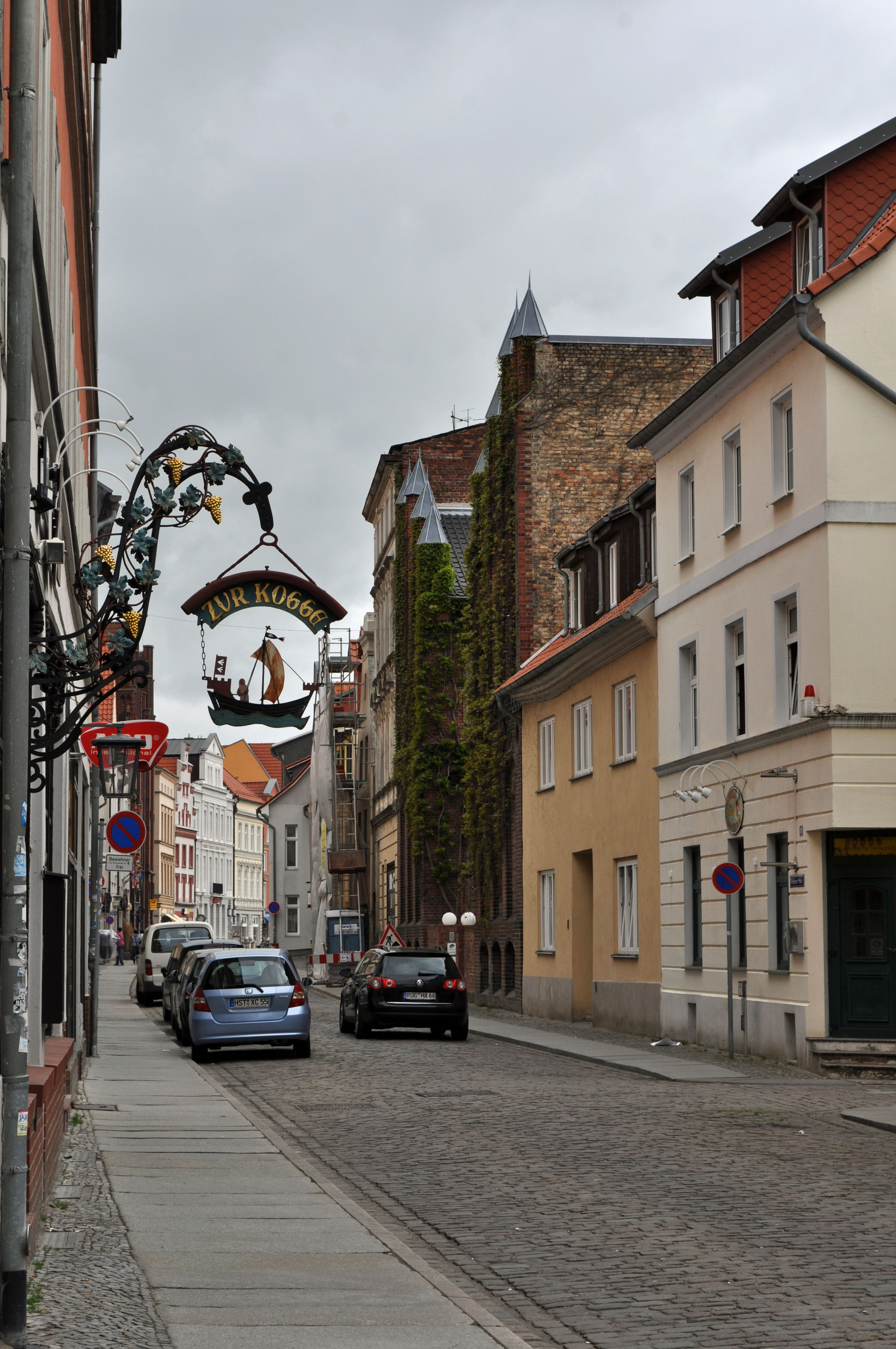 Gebäude in Stralsund, siehe Dateiname